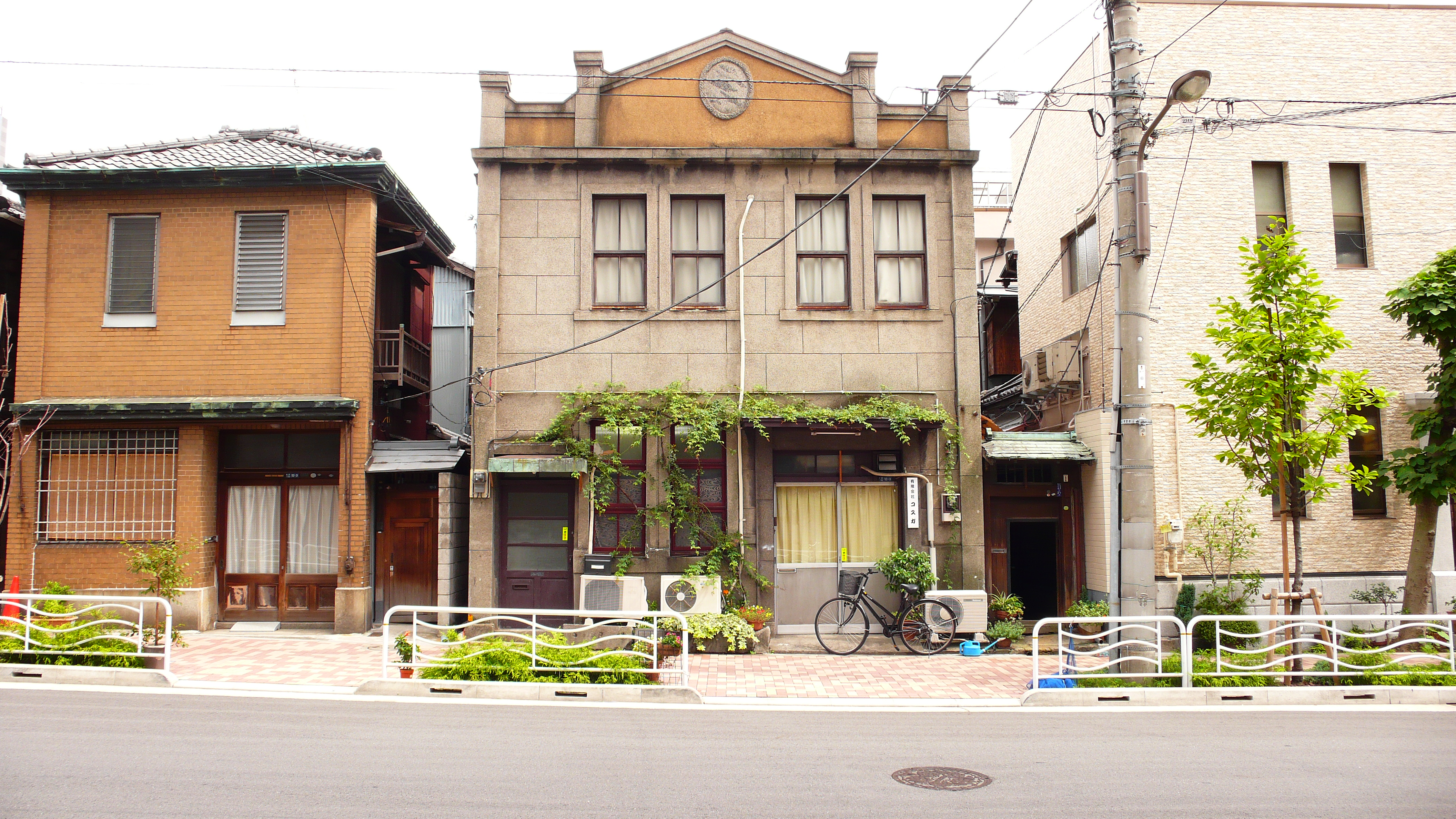 東京都江東区佐賀にある有限会社コスガ。